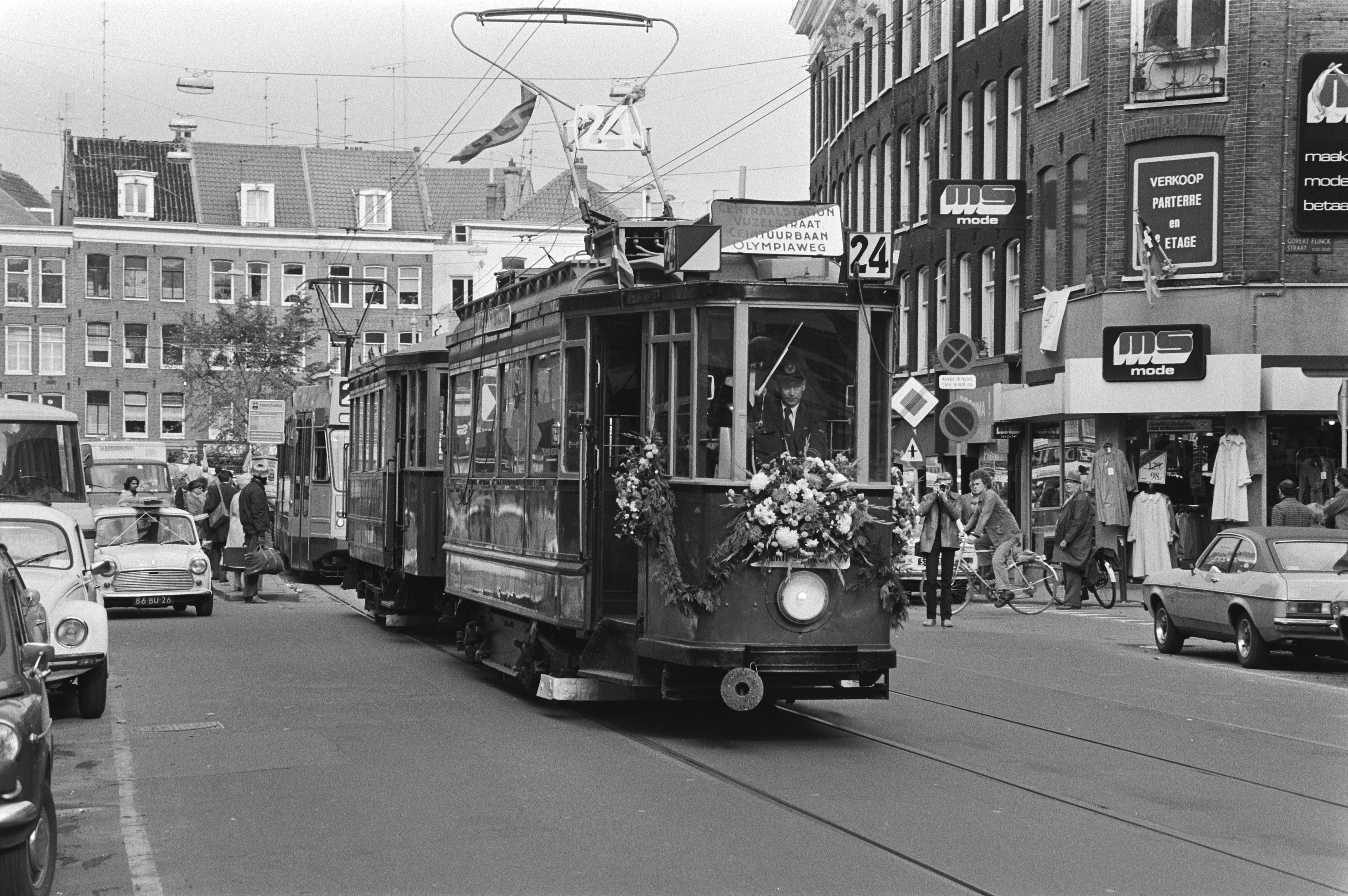 Collectie / Archief : Fotocollectie Anefo Reportage / Serie : Viering van het 50-jarig bestaan van Tramlijn 24 in Amsterdam; versierd tramstel uit de 30-er jaren Beschrijving : trams, straatbeelden, feesten, nostalgie Datum : 17 oktober 1979 Locatie : Amsterdam, Noord-Holland Trefwoorden : feesten, nostalgie, straatbeelden, trams Fotograaf : Dijk, Hans van / Anefo Auteursrechthebbende : Nationaal Archief Materiaalsoort : Negatief (zwart/wit) Nummer archiefinventaris : bekijk toegang 2.24.01.05 Bestanddeelnummer : 930-4938